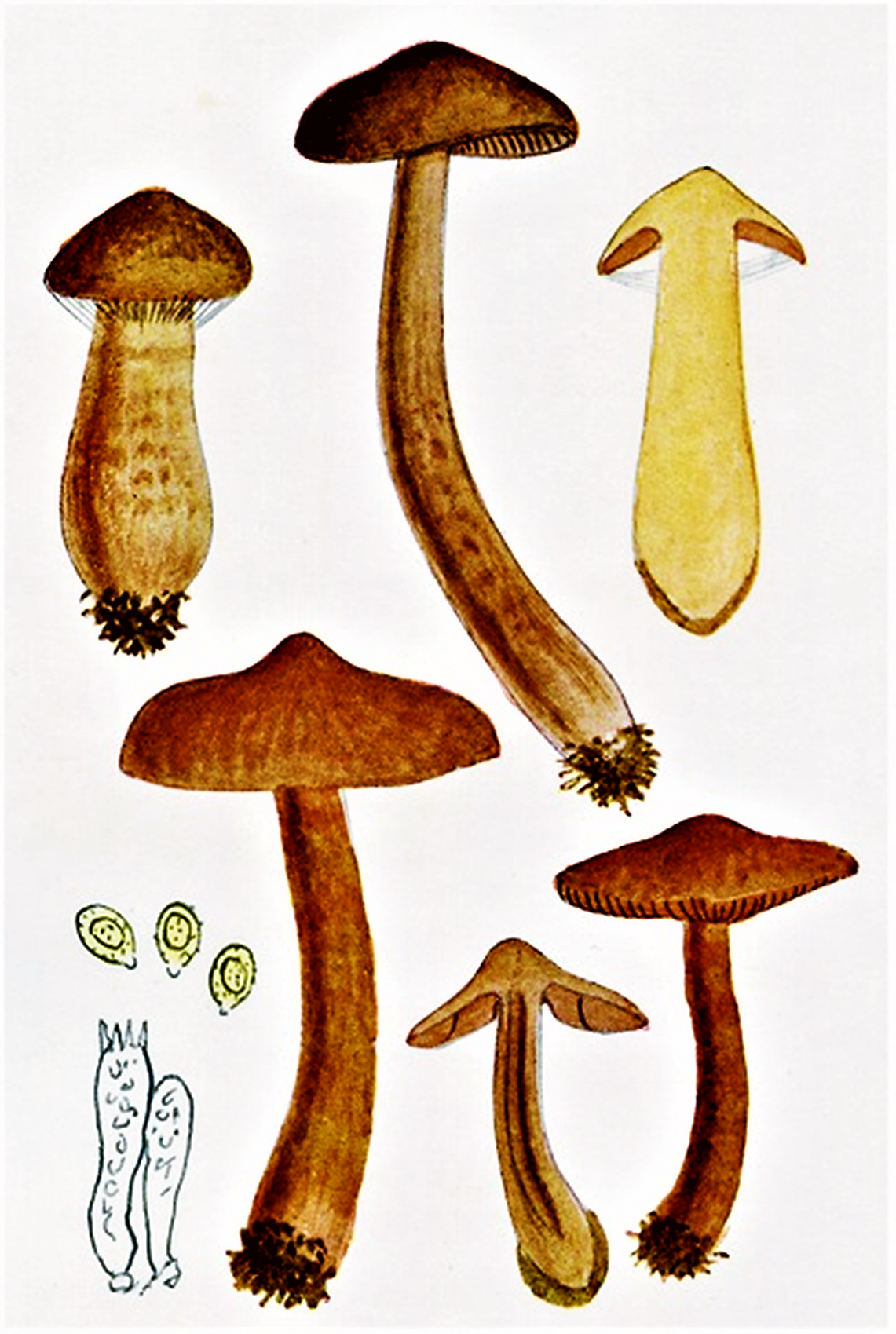 Giacomo Bresadola: Cortinarius rubellus Cooke) (1887) als Cortinarius brunneo-fulvus